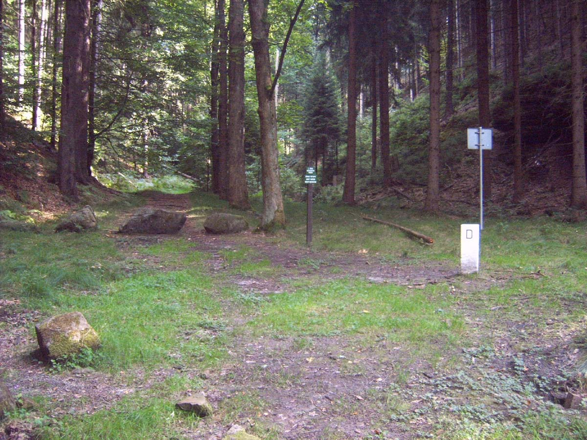 Großer Zschand in der Sächsischen Schweiz - Grenze nach CZ